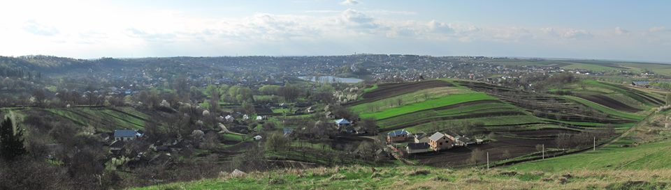 Фото села Стецева. Вид з південного сходу.